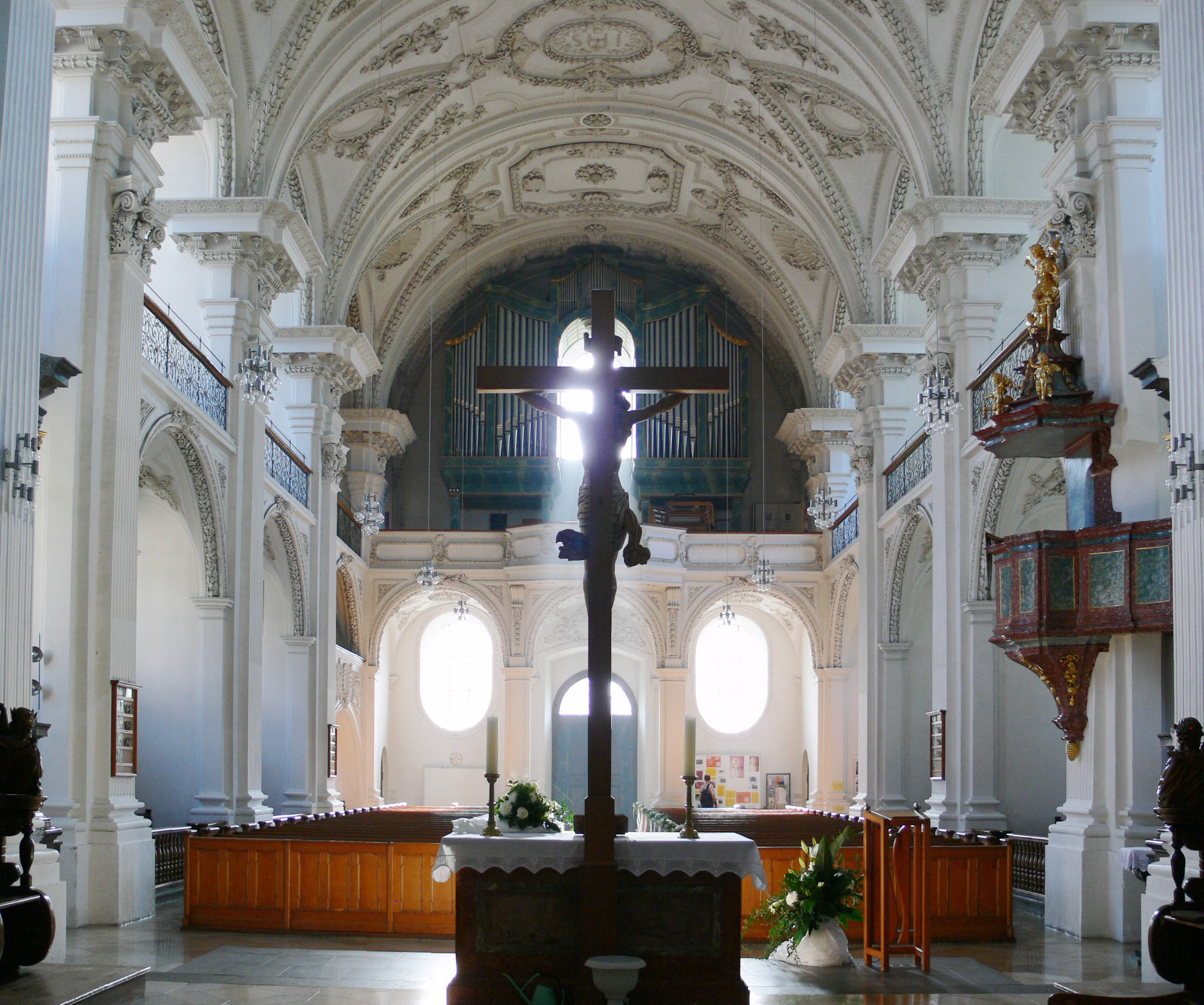 Schlosskirche Friedrichshafen (ehem. Klosterkirche Hofen) Blick vom Chor ins Hauptschiff